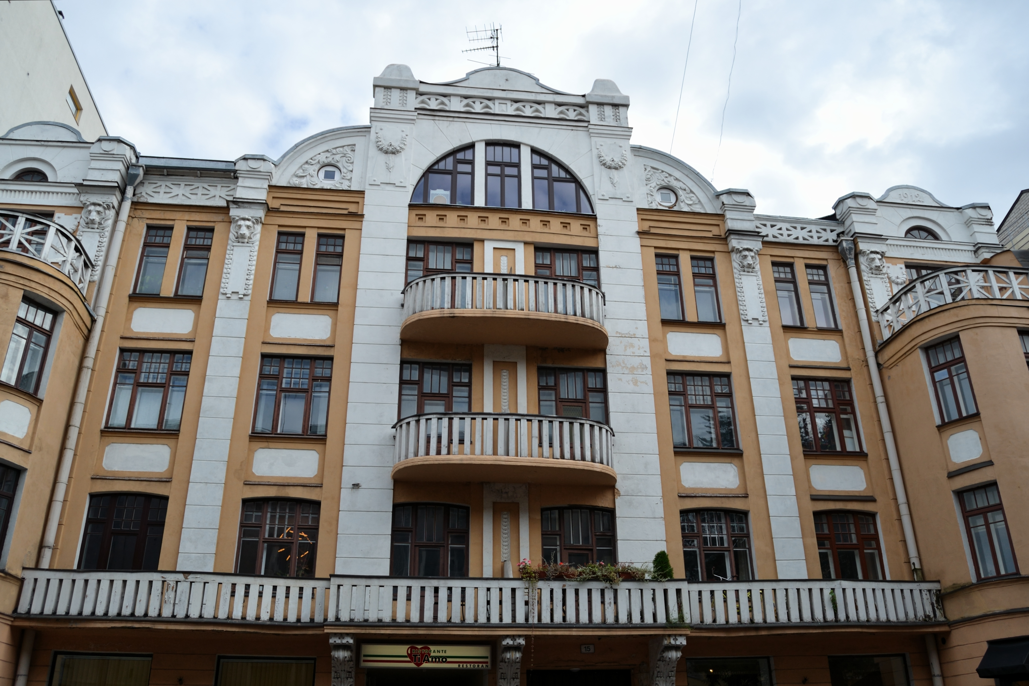 Tallinn, elamu Roosikrantsi 15, 1912